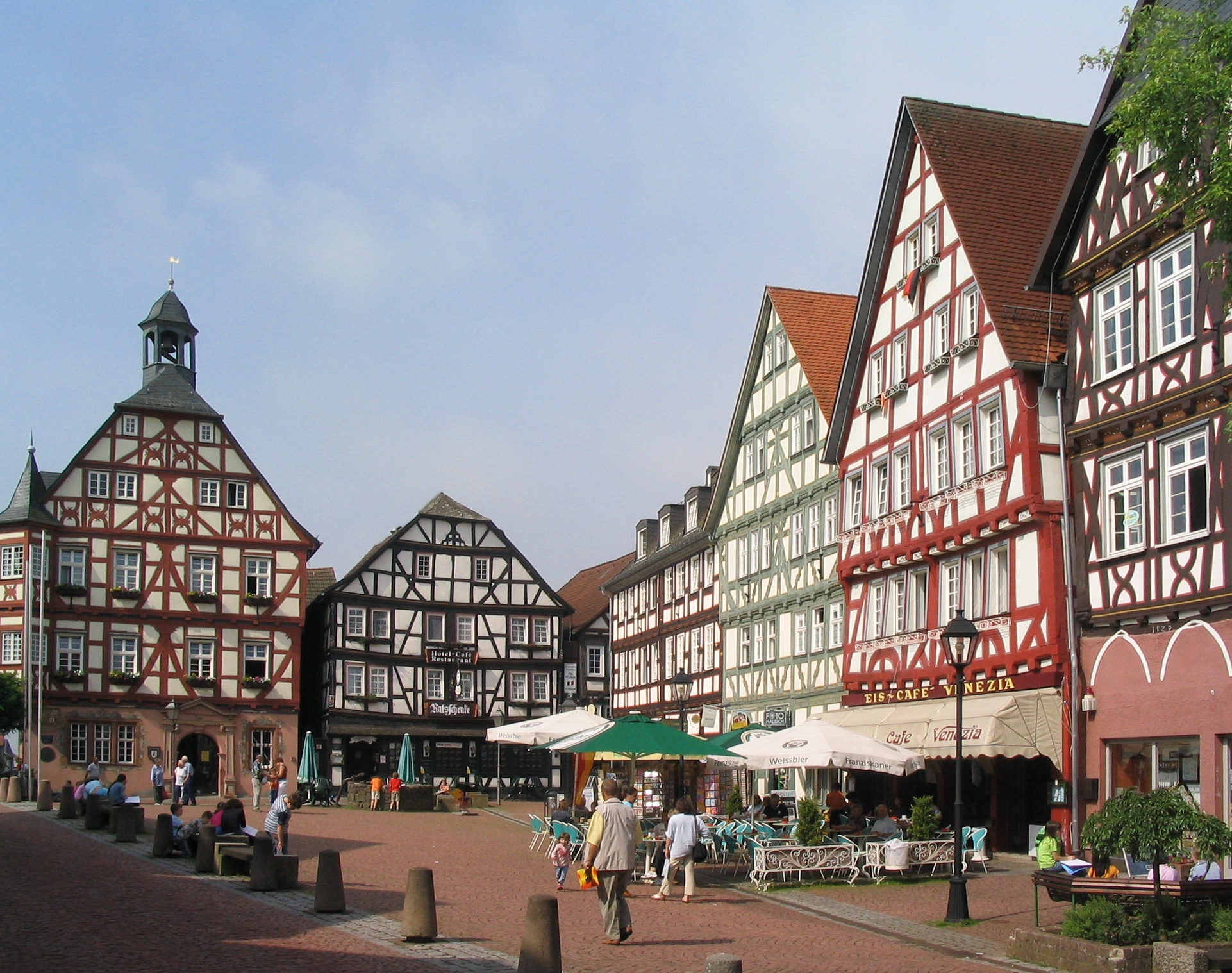 Grünberg, Germany market suqare. // Marktplatz in Grünberg, Hessen